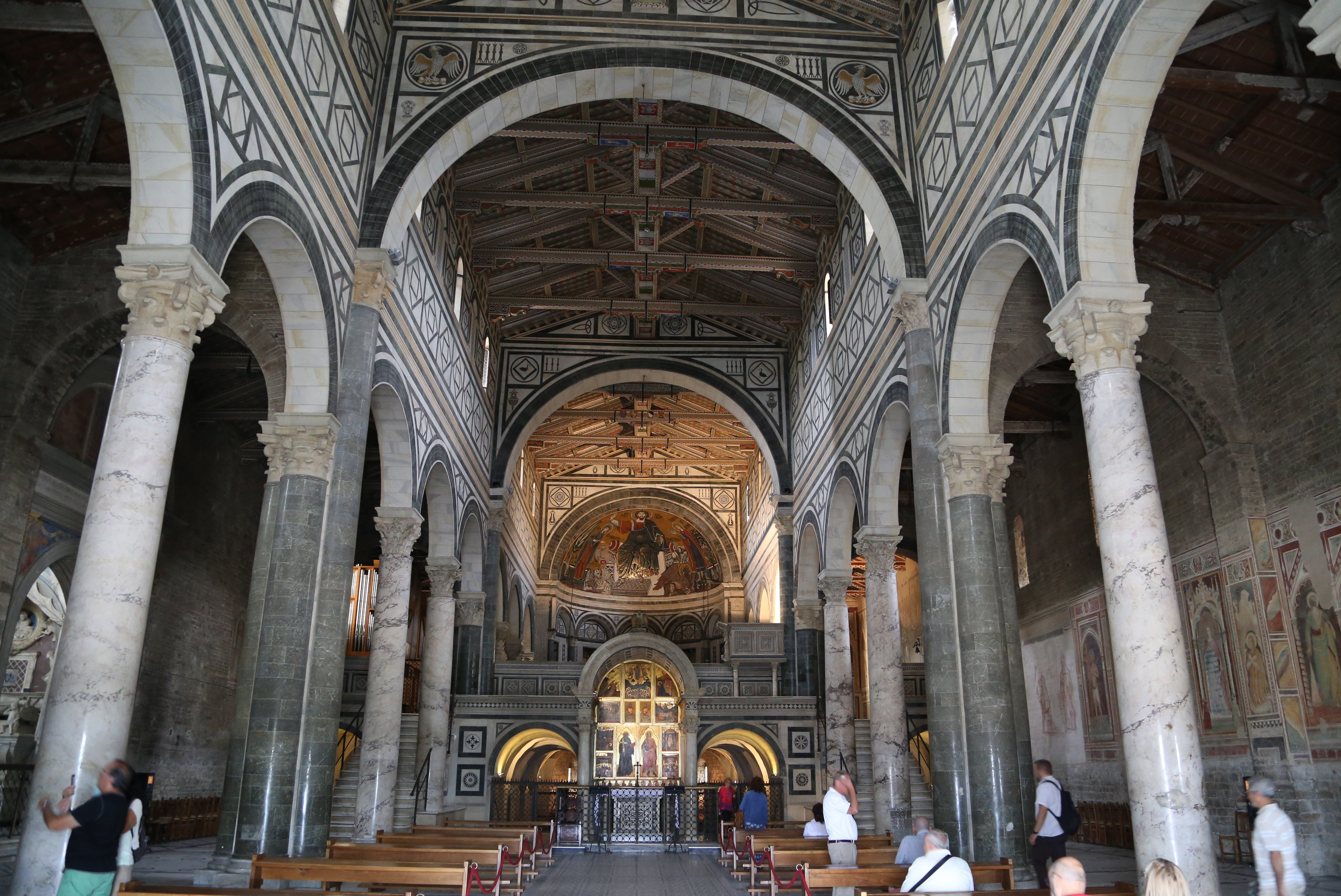 Innenraum, San Miniato al Monte, Florenz